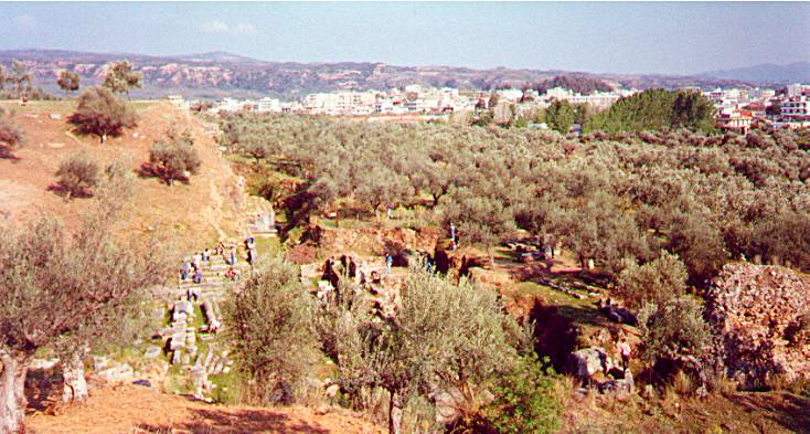 Ruïnes van Sparta